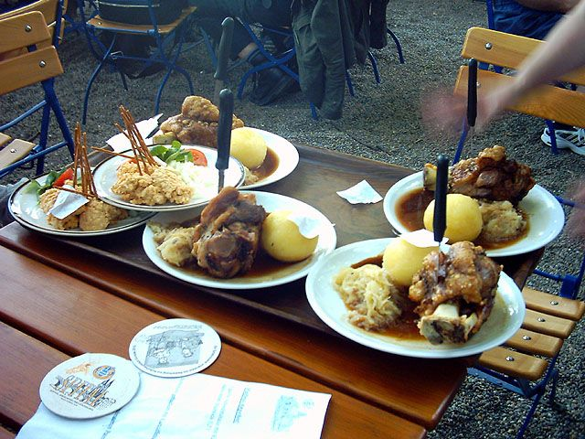 Bayerische Küche: Schweinshaxn und Obatzder im Biergarten „Spitalgarten“ in Regensburg, Deutschland